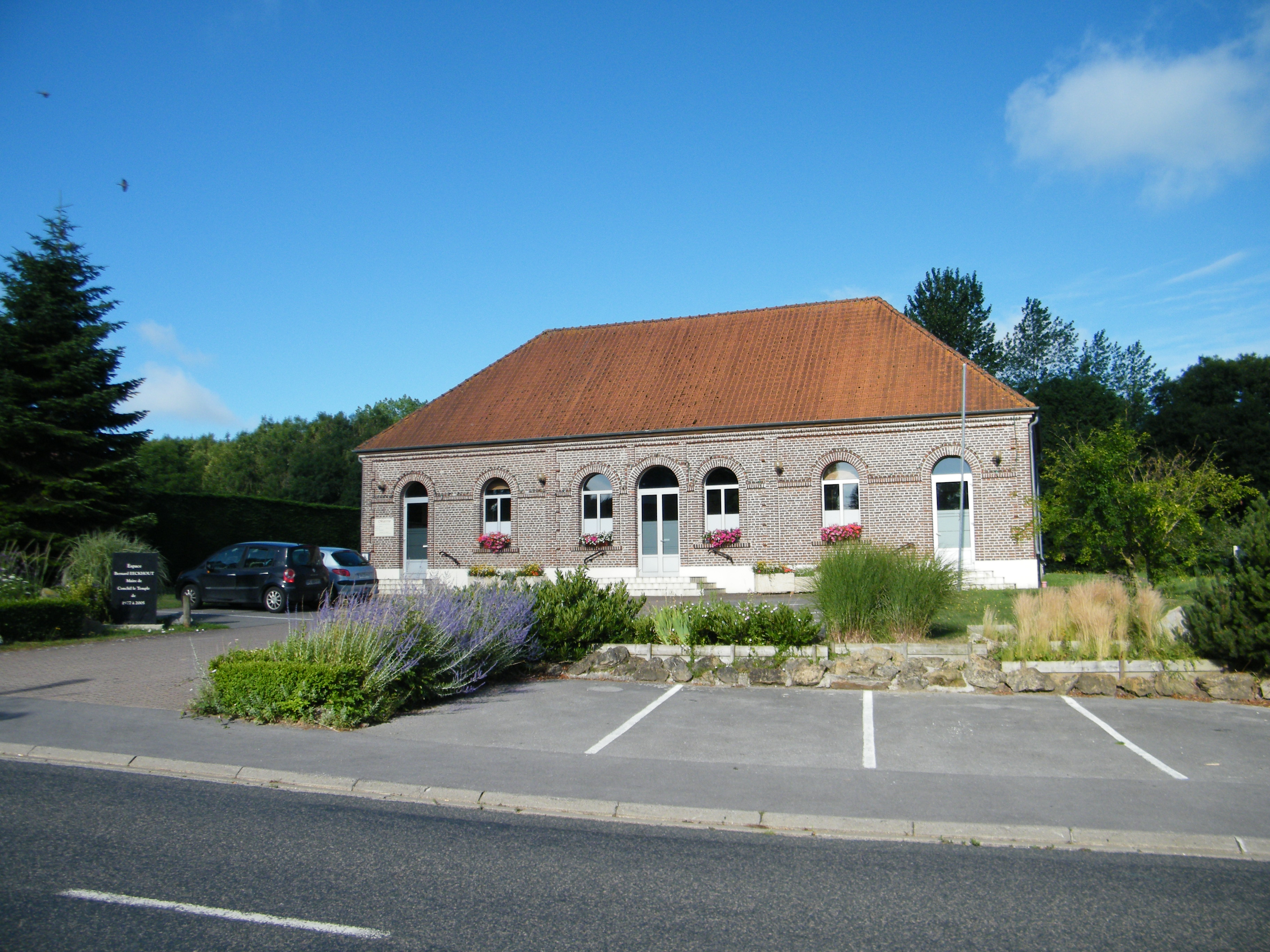 Conchil-le-Temple, Pas-de-Calais, France